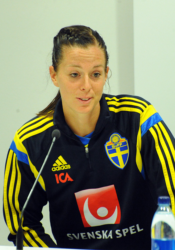 a_137_2299